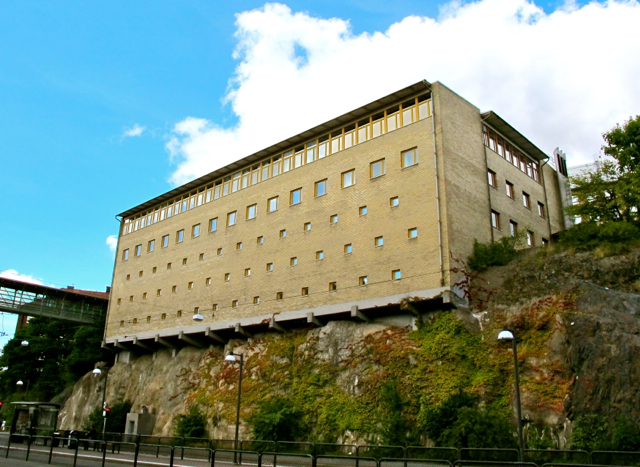 Biomedicinska biblioteket vid Medicinaregatan 4 i Göteborg, en av Göteborgs universitetsbiblioteks filialer. Fasaden mot Per Dubbsfatabn. Nedre våningarna med små fönster innehåller bokmagasin, däröver kontor och översta våningen är läsesalar.